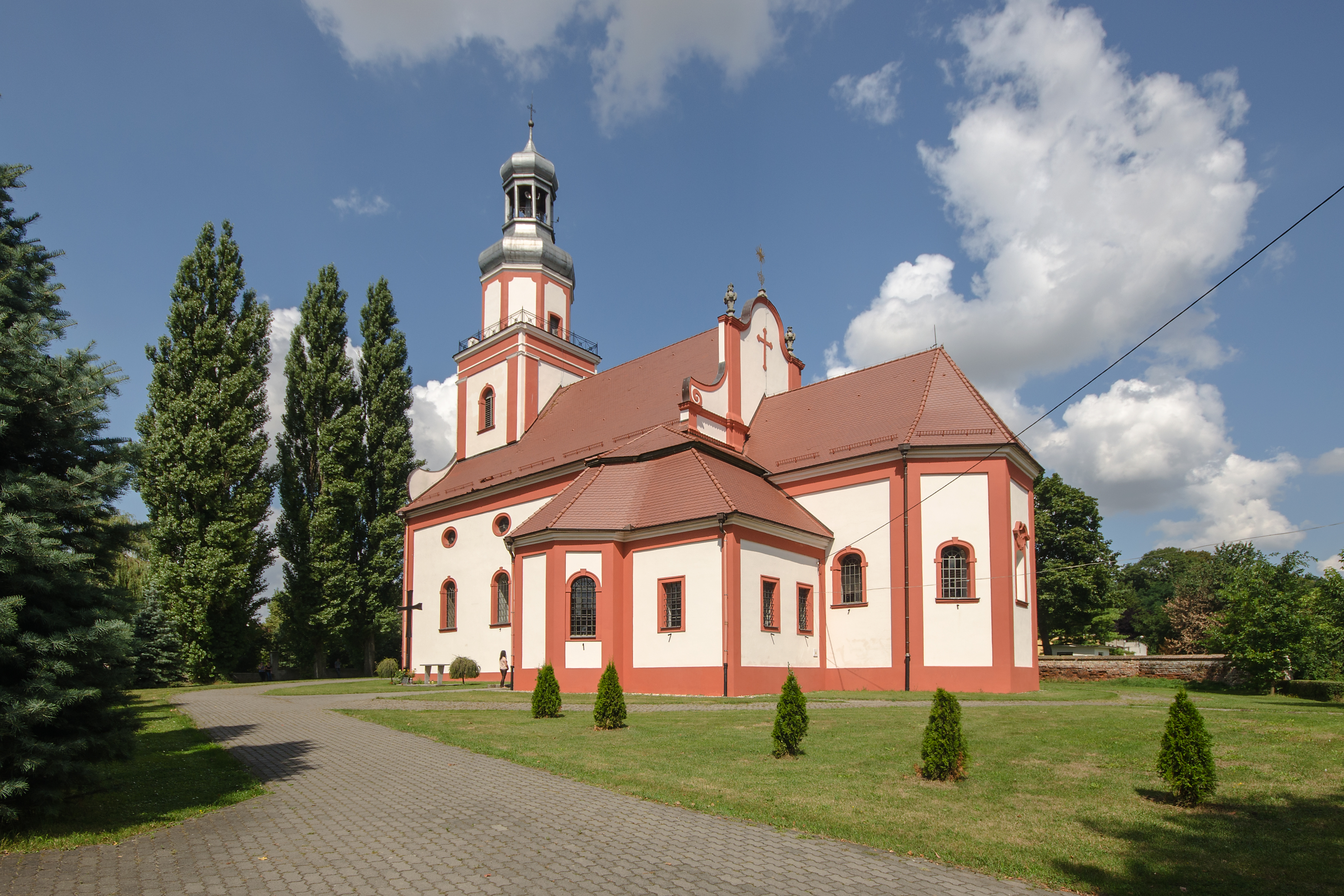 Łosiów, kościół par. p.w. św. Jana Chrzciciela, 1 poł. XVIII